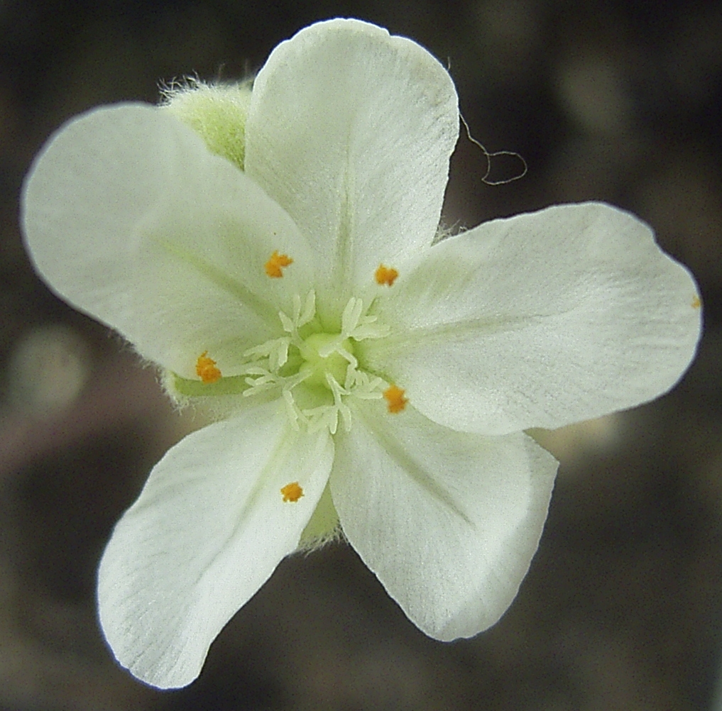 Drosera lanata flora